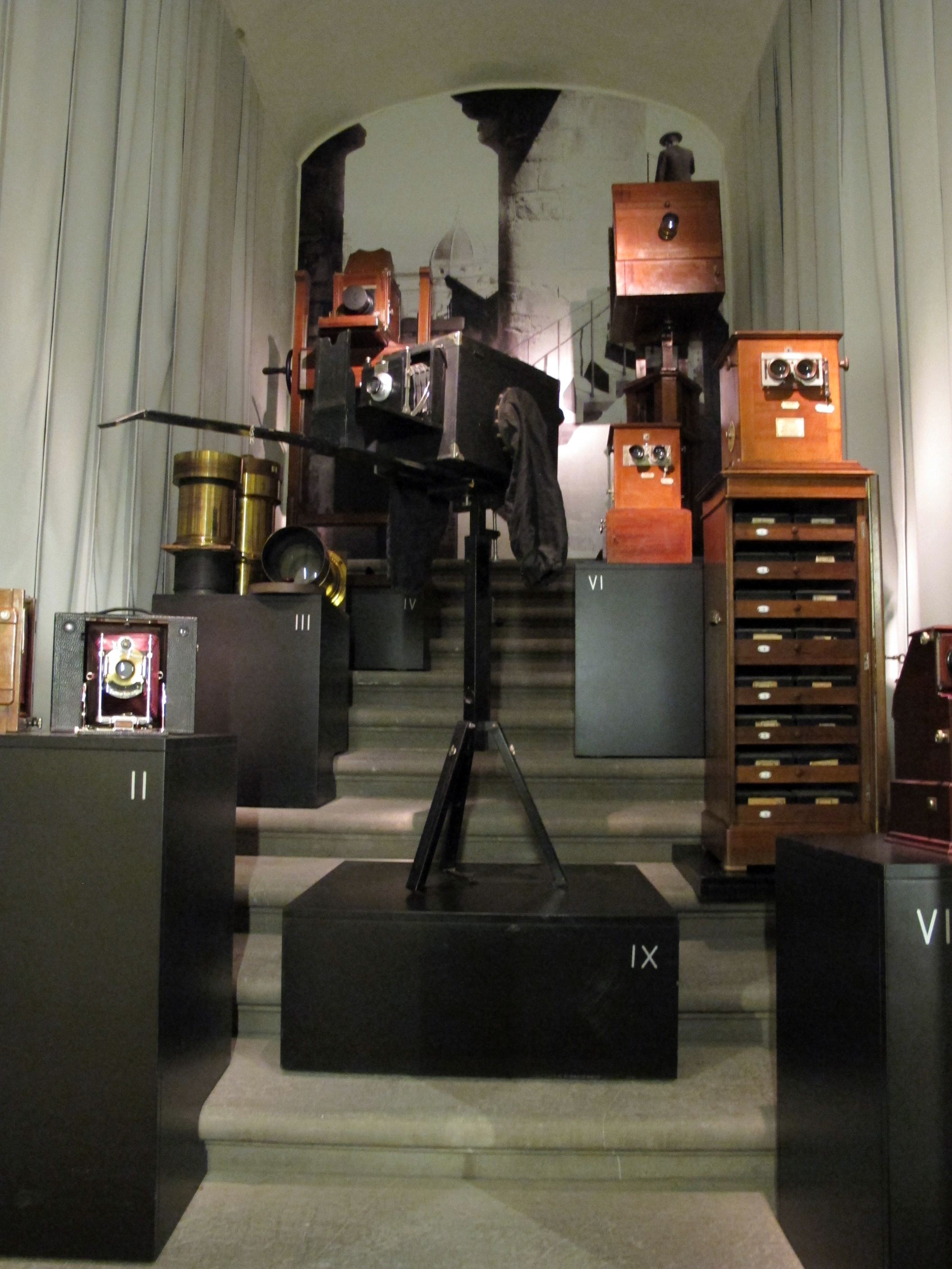 Museo alinari della fotografia, interno